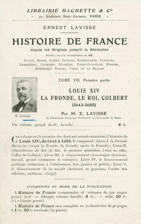 Prospectus de la librairie Hachette lors de la parution du tome VII/1 de l'Histoire de France depuis les origines jusqu'à la Révolution d'Ernest Lavisse (1842-1922).